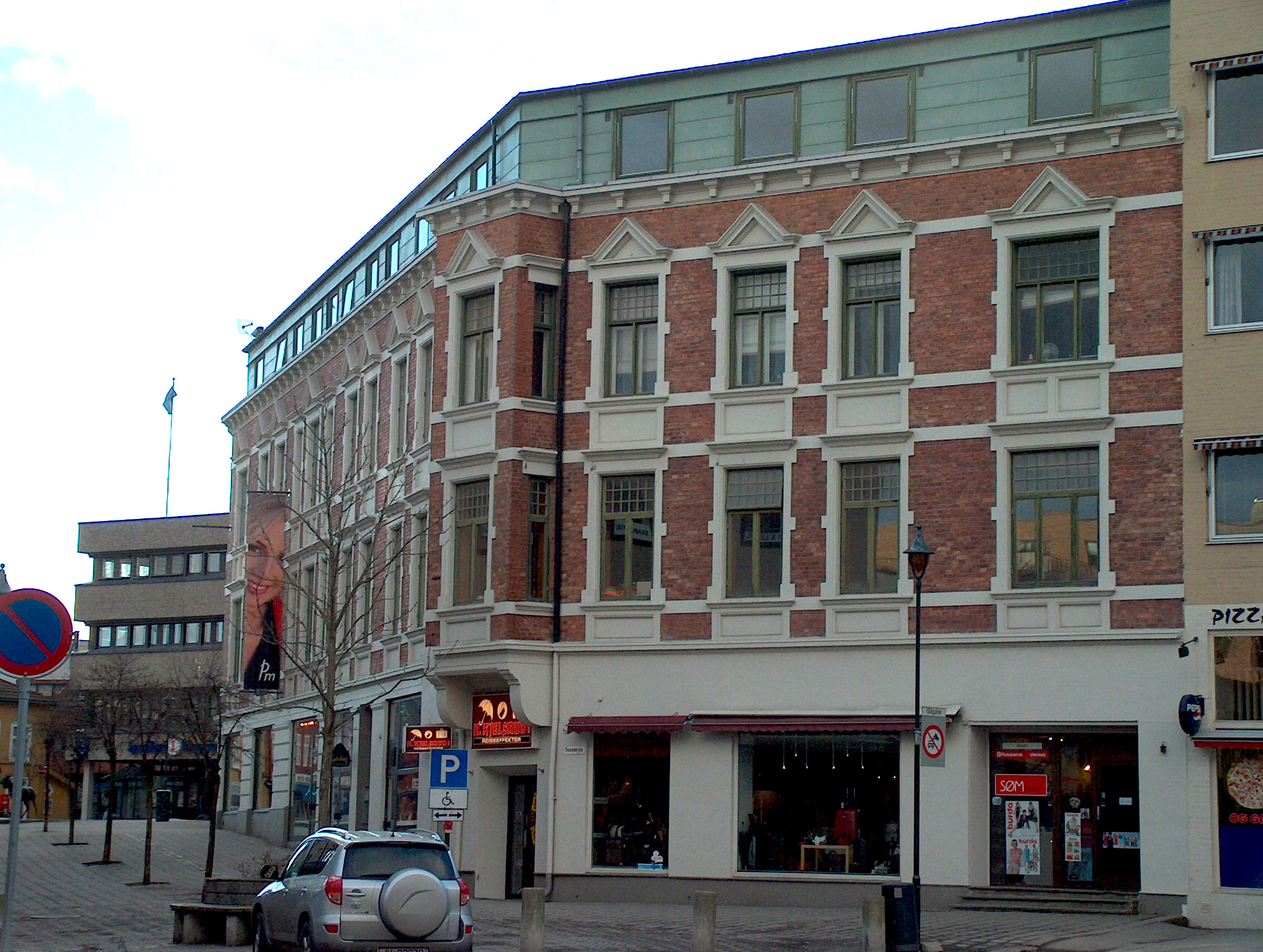 Thistedgården (nord) i Hønefoss (Norway)